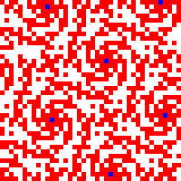 Quadratische Reste modulo 12-13i nach T.N. Thiele. Selbstgemacht. Gnufdl